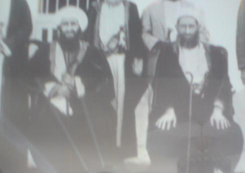 من يمين الشاشة الشيخ محمد وعيسى بن صالح الطائي